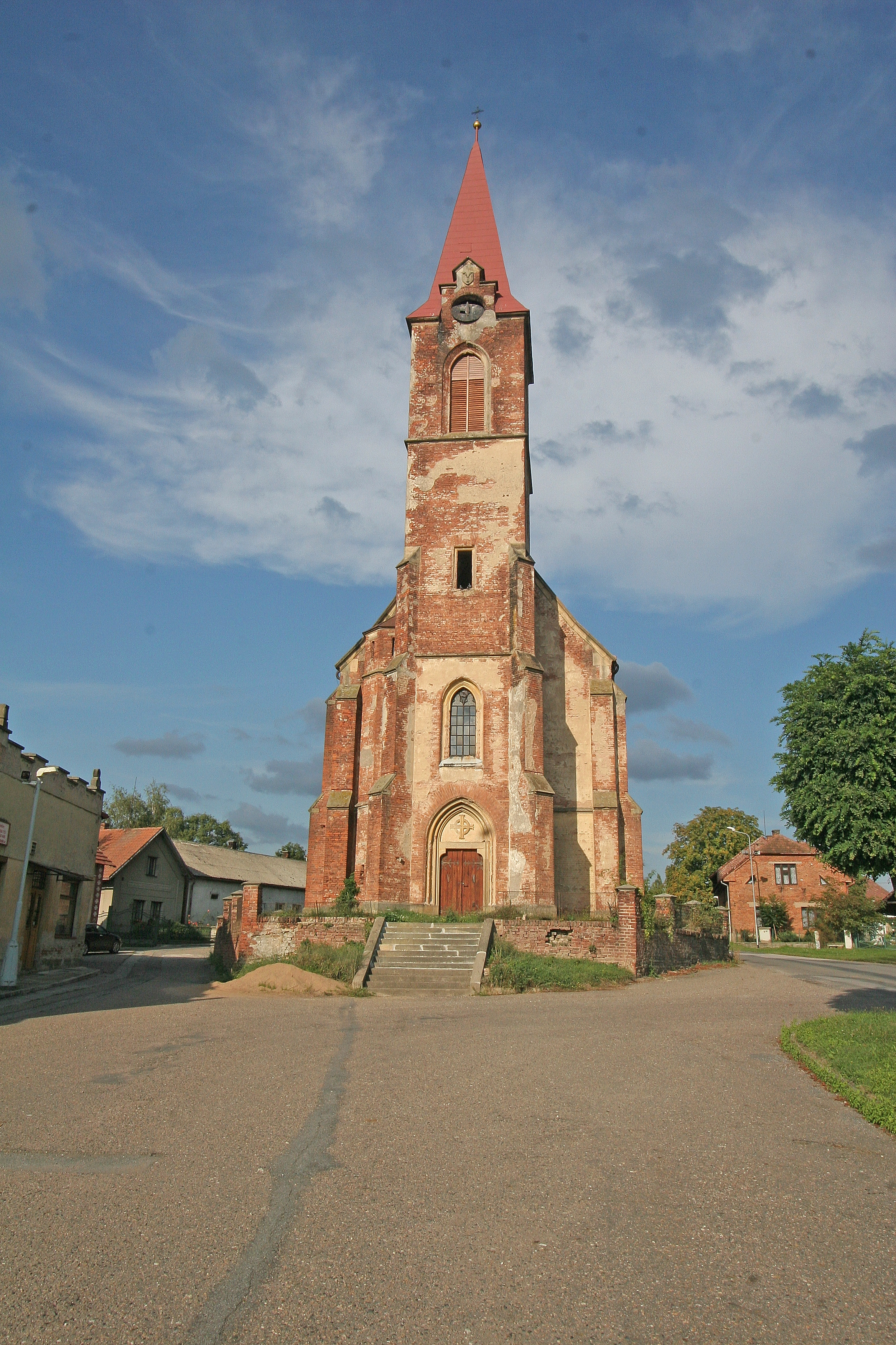 Kostel Nejsvětější Trojice (Suchá), Suchá